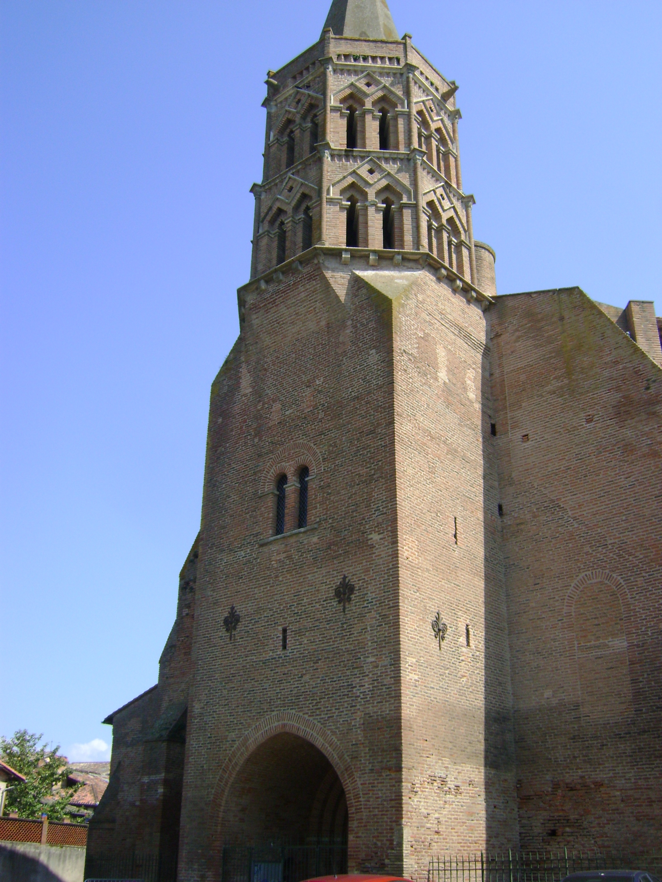 Eglise de Lisle sur Tarn, Tarn .